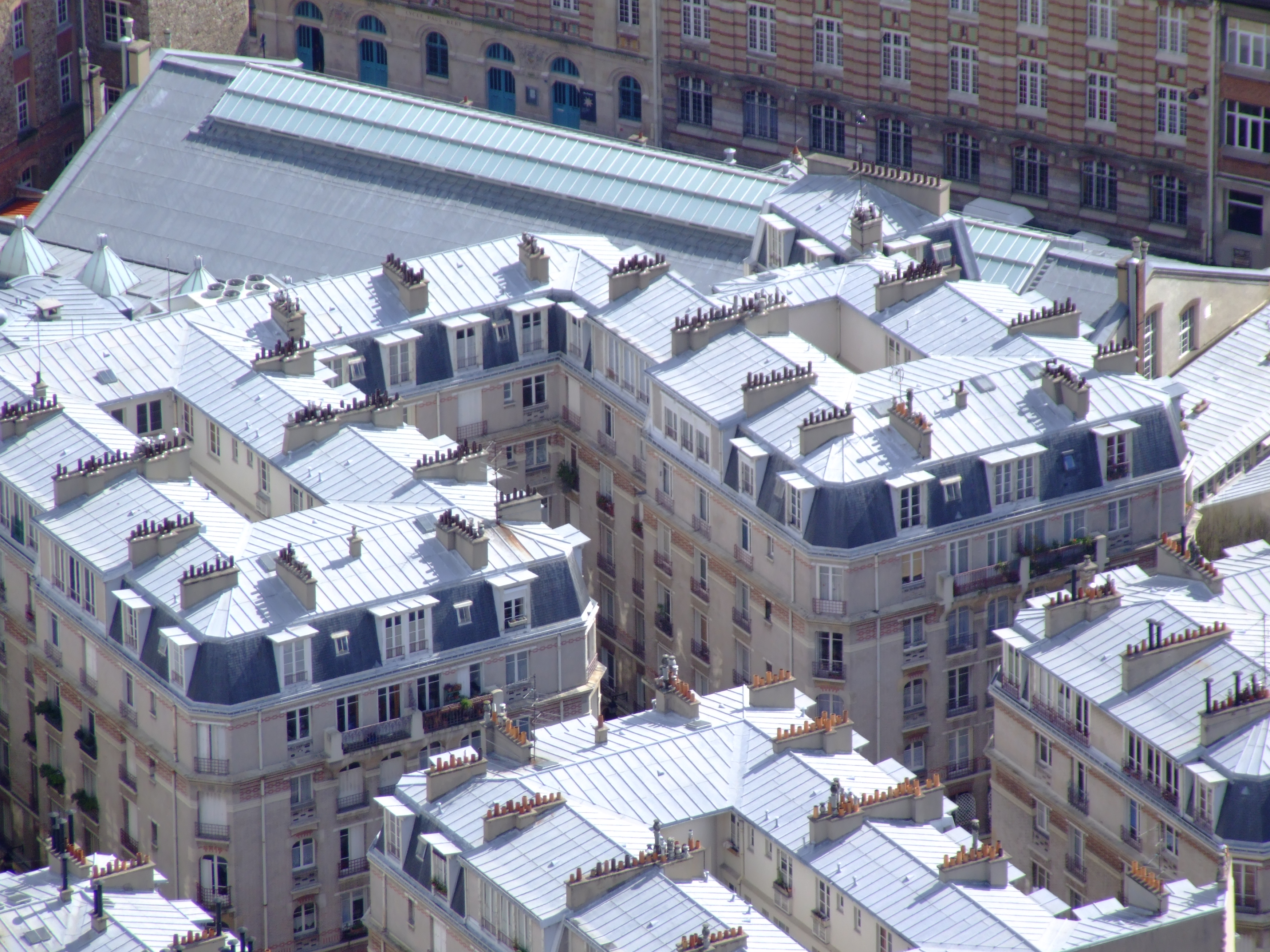 Mansardendächer Square Delambre, Dach der Turnhalle Gymnase municipal Huyghens, 10 rue Huygens und Fassade des Gymnasiums Lycée Paul Bert, 7 rue Huygens, Montparnasse, XIVe arrondissement, Paris, France.